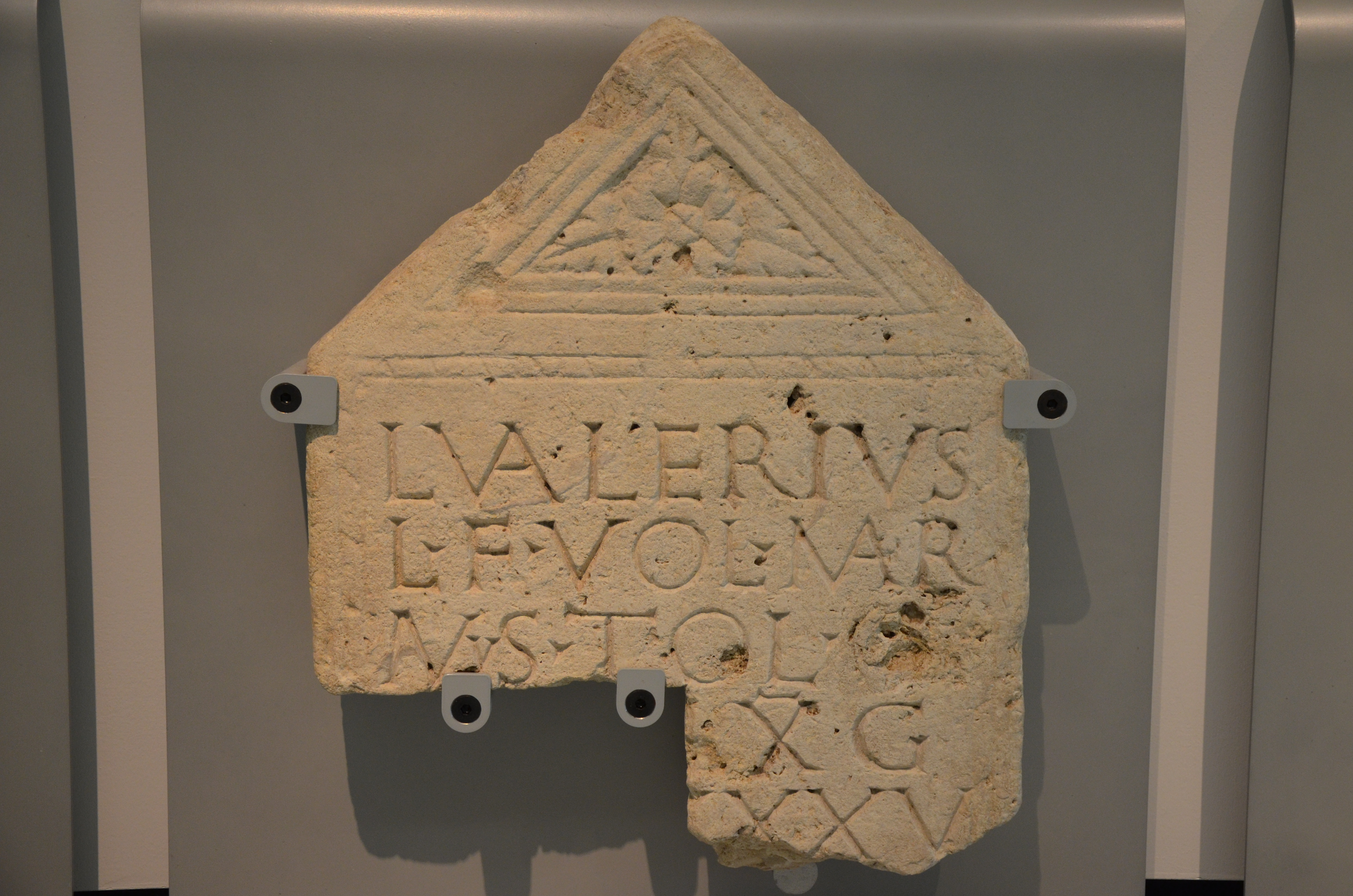 Museum het Valkhof, Nijmegen (Netherlands)